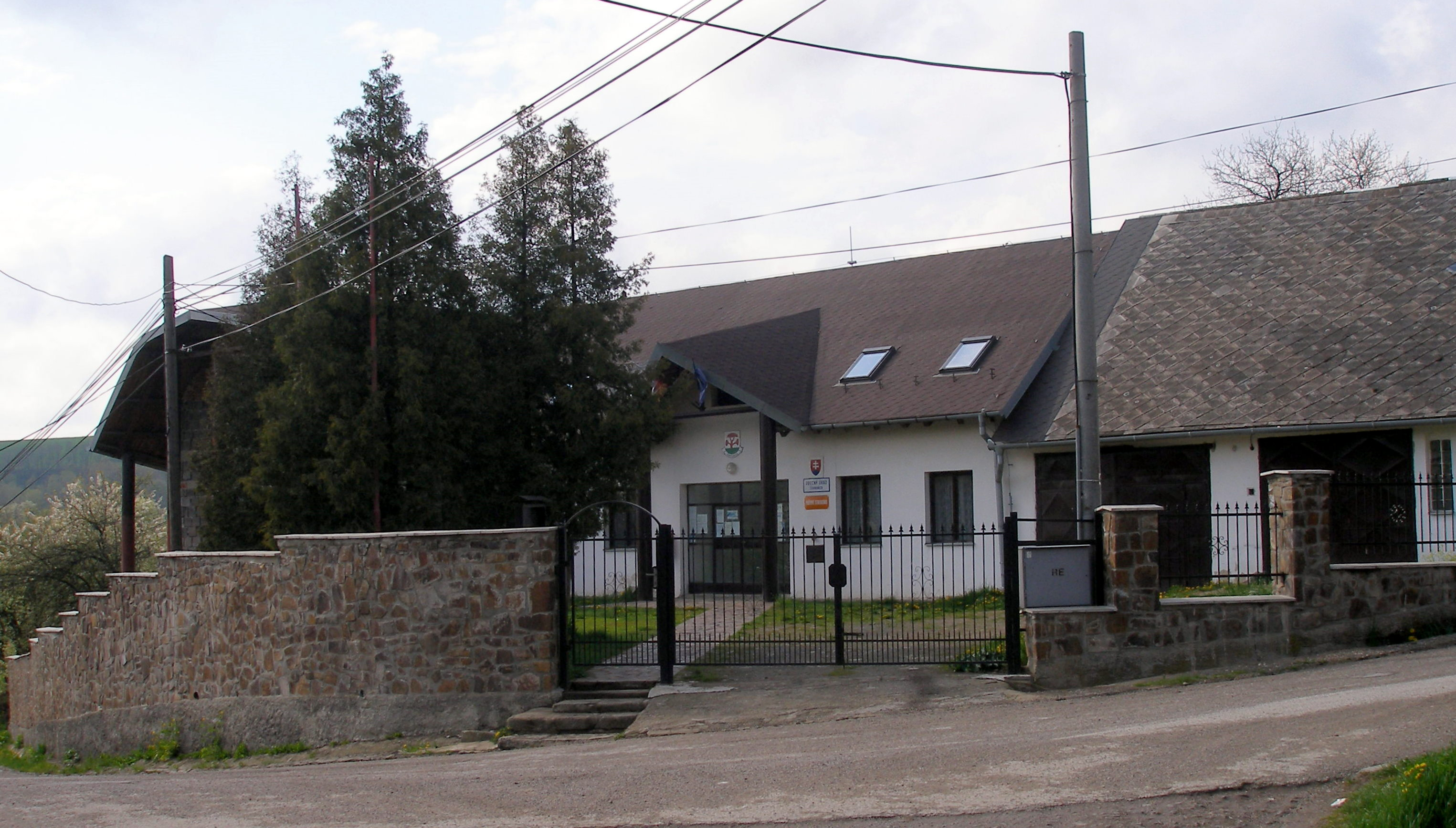 Obec Červenica okres Prešov región Šariš